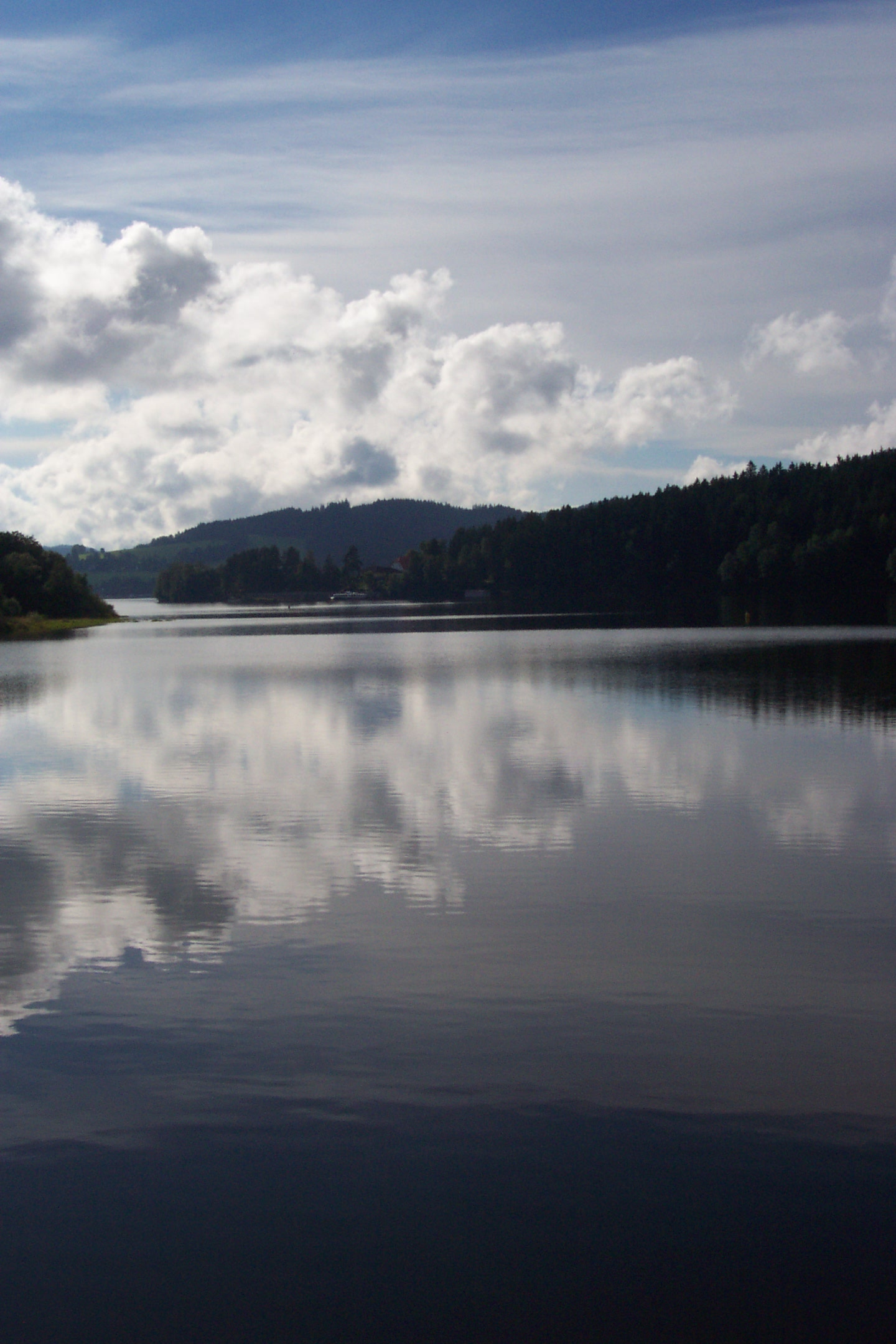 Šumava, Czech republic, The Lipno nad Vltavou dam - Šumava, Přehrada Lipno nad Vltavou